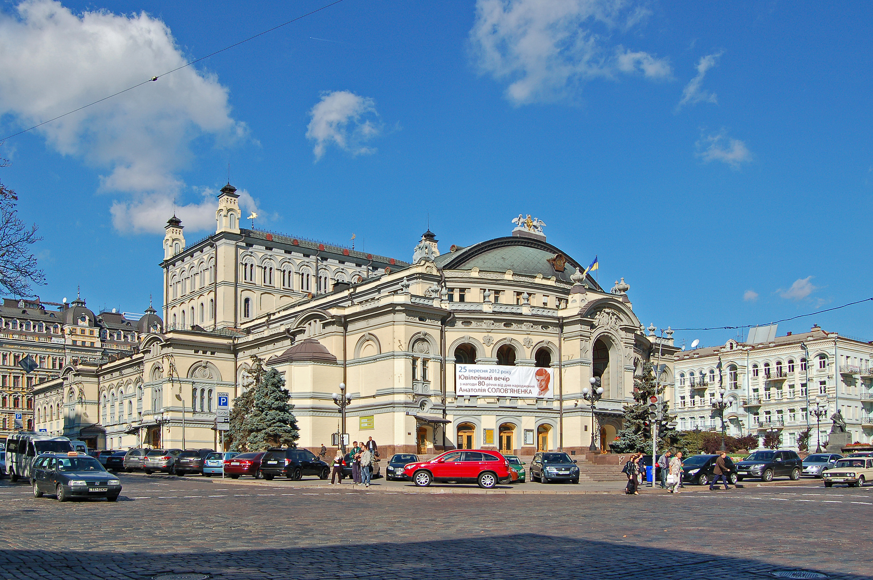 Будівля Національної опери України у Києві (вул. Володимирська, 50)